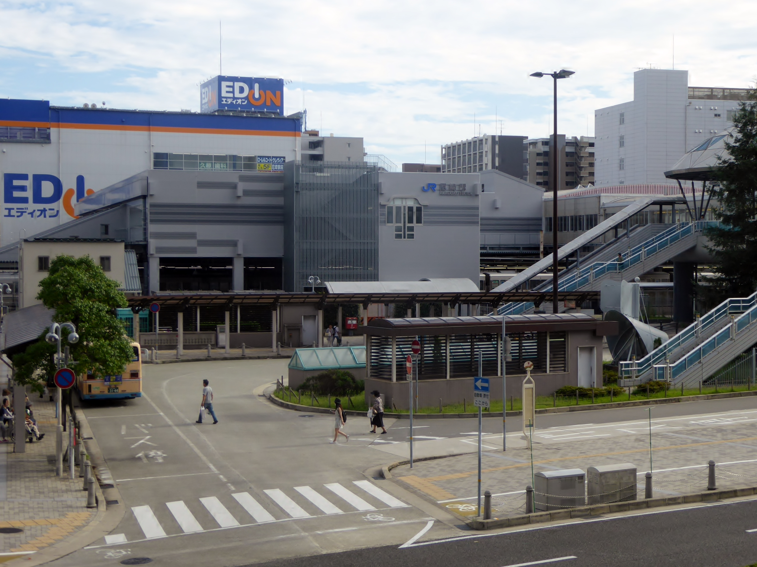 JR尼崎駅を撮影。